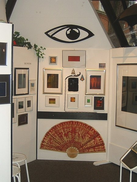 Holografiemuseum (innen) in Esens . Kleines Museum auf 3 Stockwerke verteilt mit Kaufmöglichkeit.